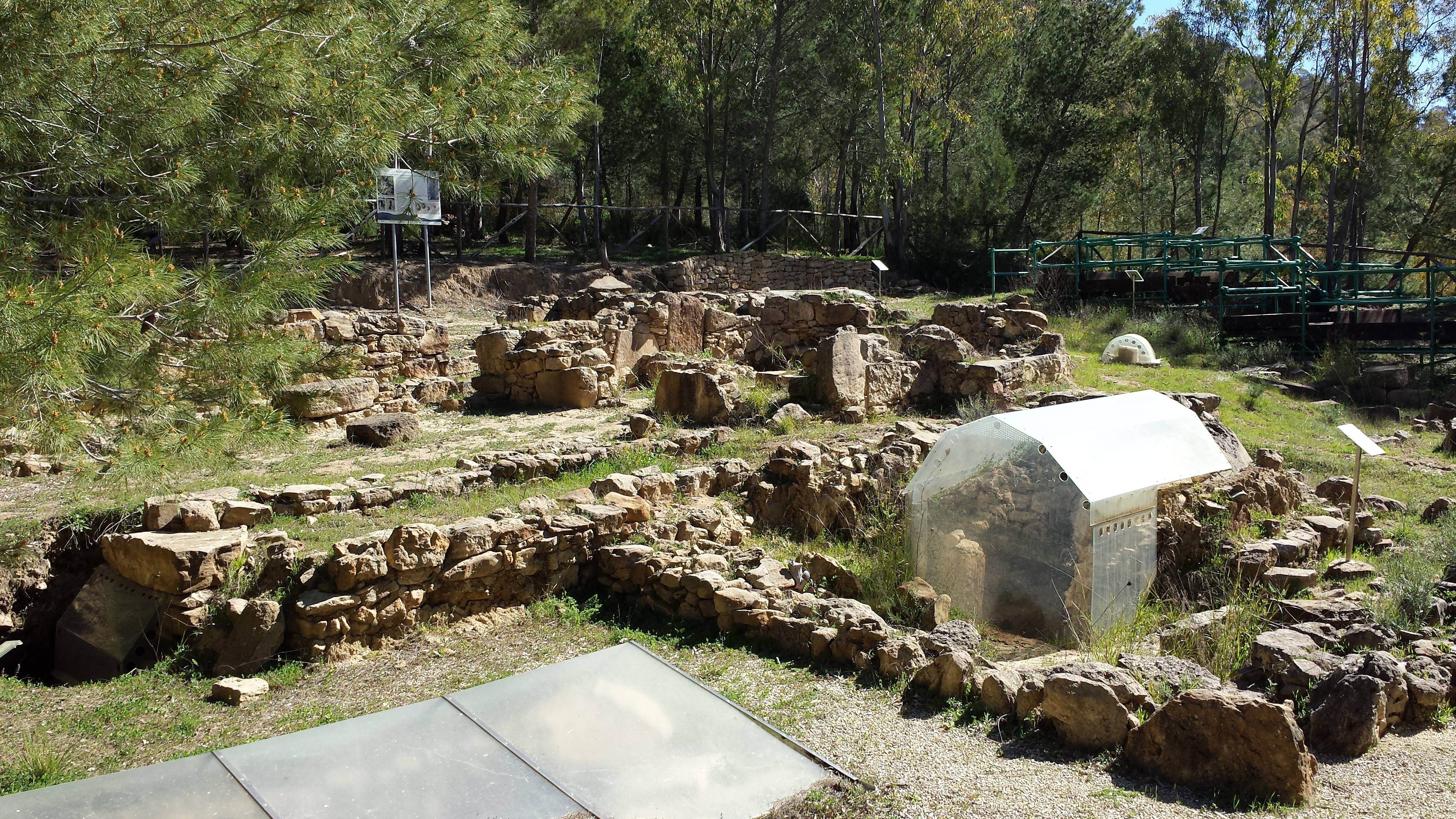 Necropoli di Piano Cannelle, Montagna della Ganzaria, foto scatta personalmente